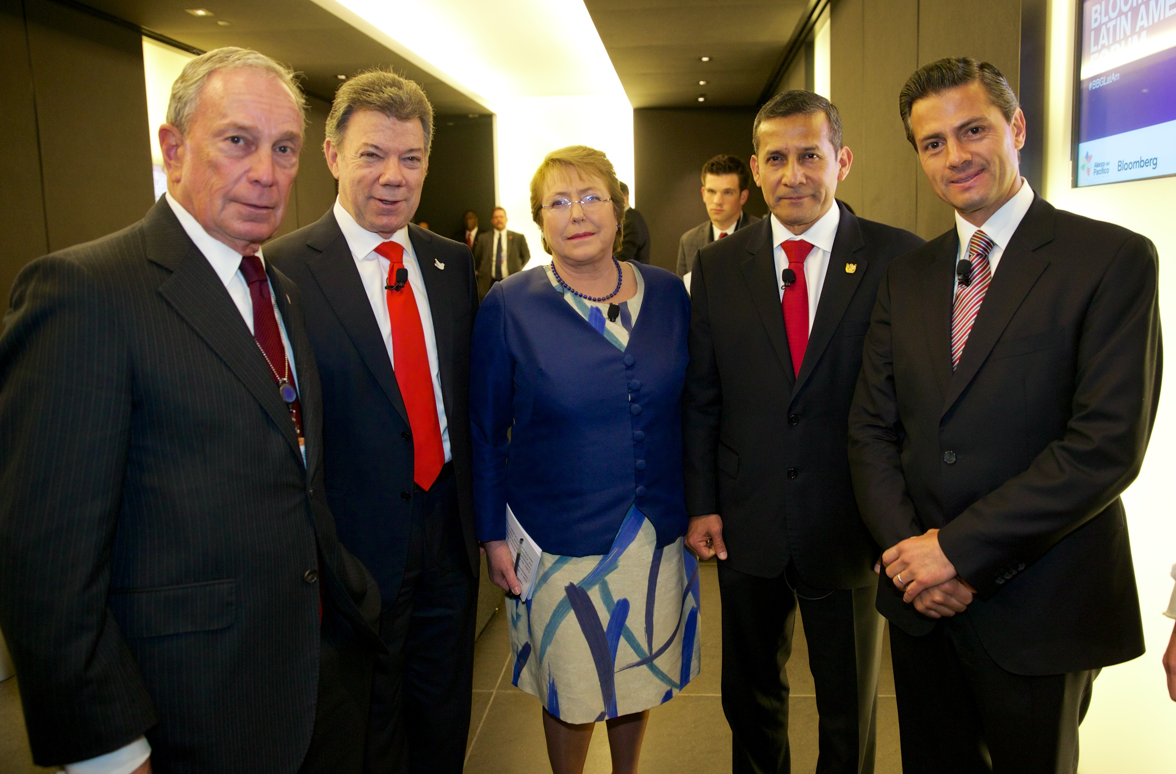 Primer Foro Latinoamericano Bloomberg: Auspiciando la Alianza del Pacífico. 22 de septiembre de 2014.